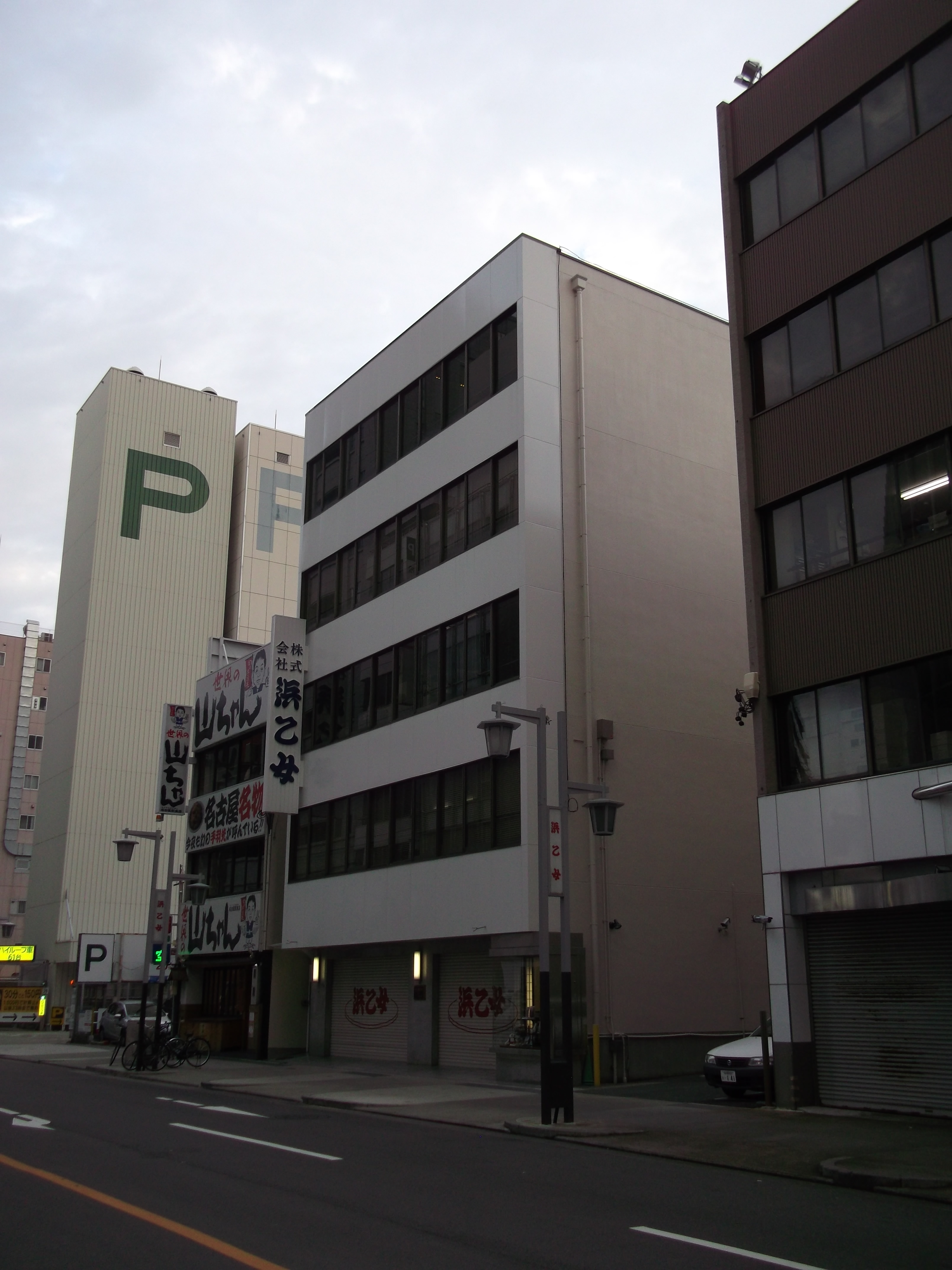 名古屋市中村区名駅の浜乙女本社を西側より撮影